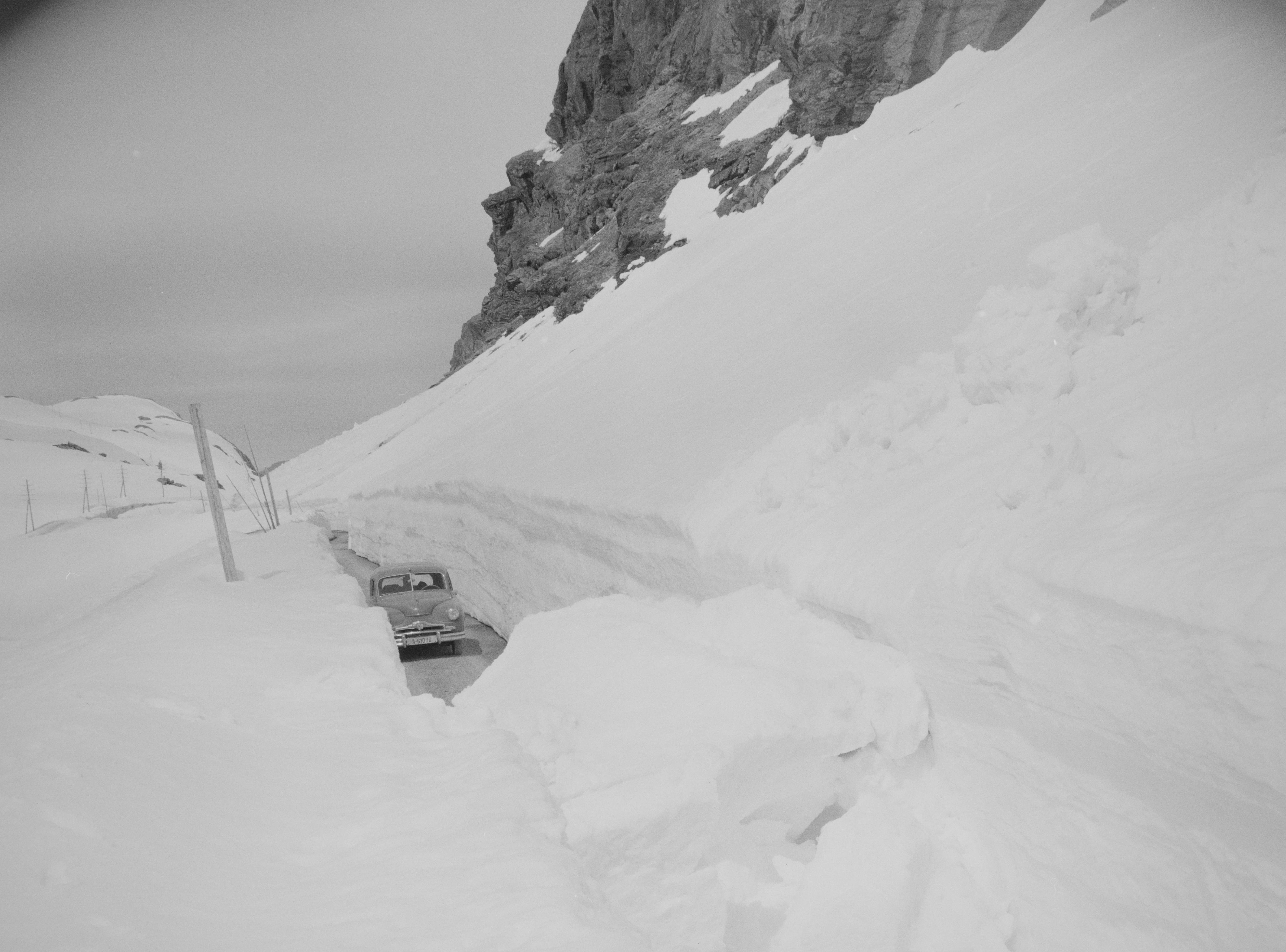 Bildet er hentet fra Nasjonalbibliotekets bildesamling Dyrskar,Haukelifjell, Odda, Hordaland